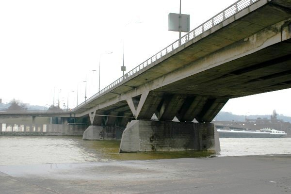 D'Bréck vum rietsen Uwänner gesinn. Ougrée Ougrée Bréck